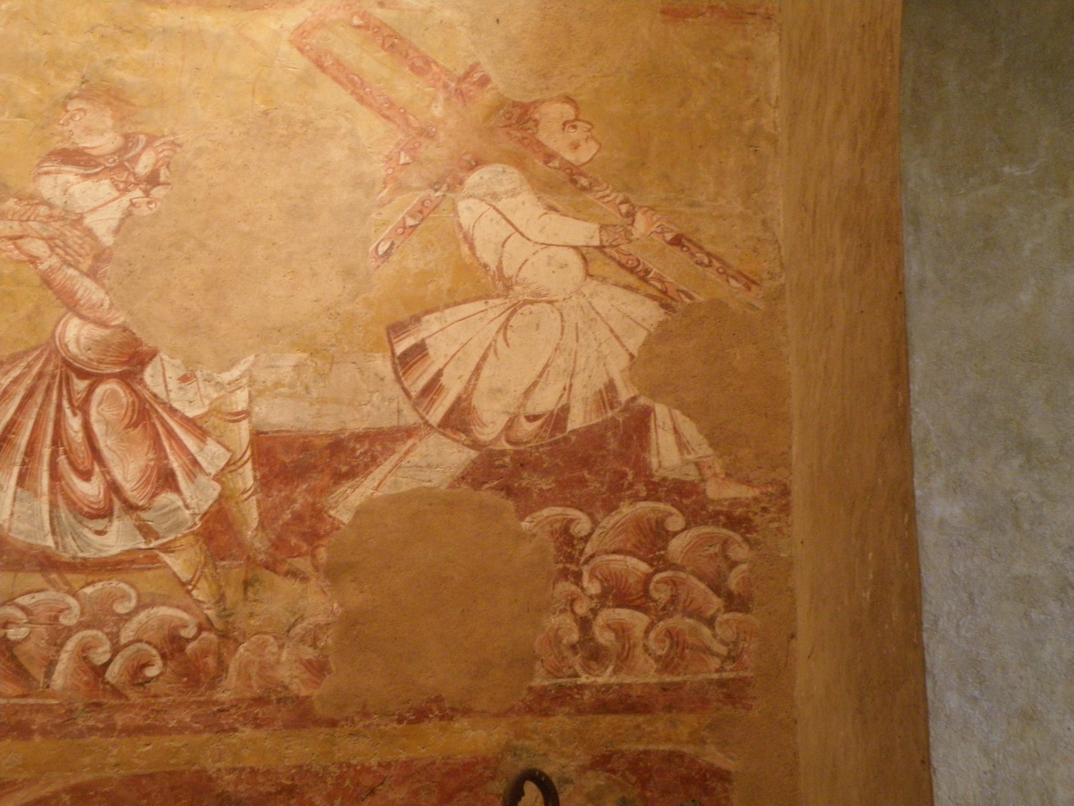 Simon de Cyrène portant la croix sur le chemin vers la crucifixion